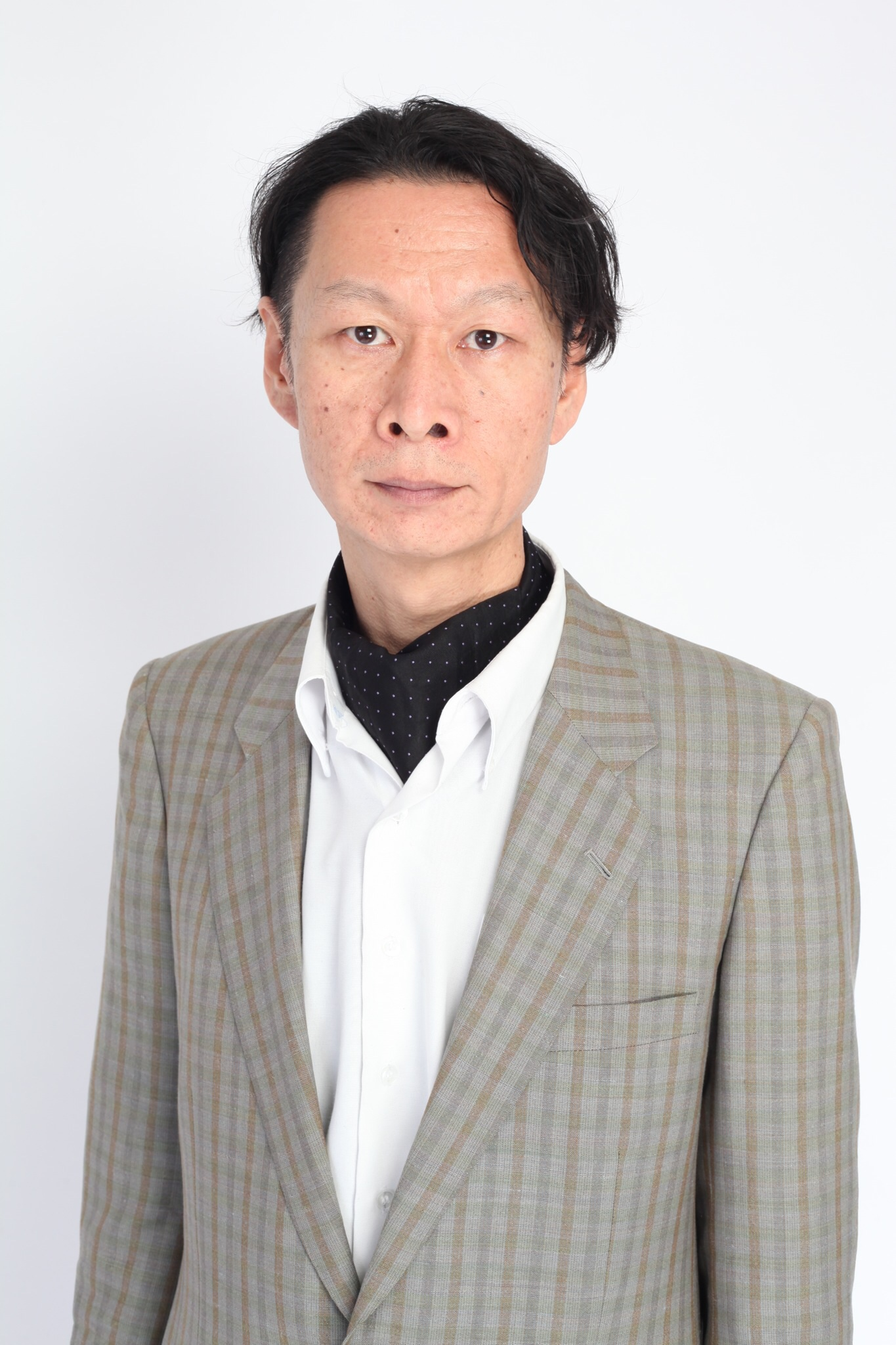 近藤善揮プロフィール